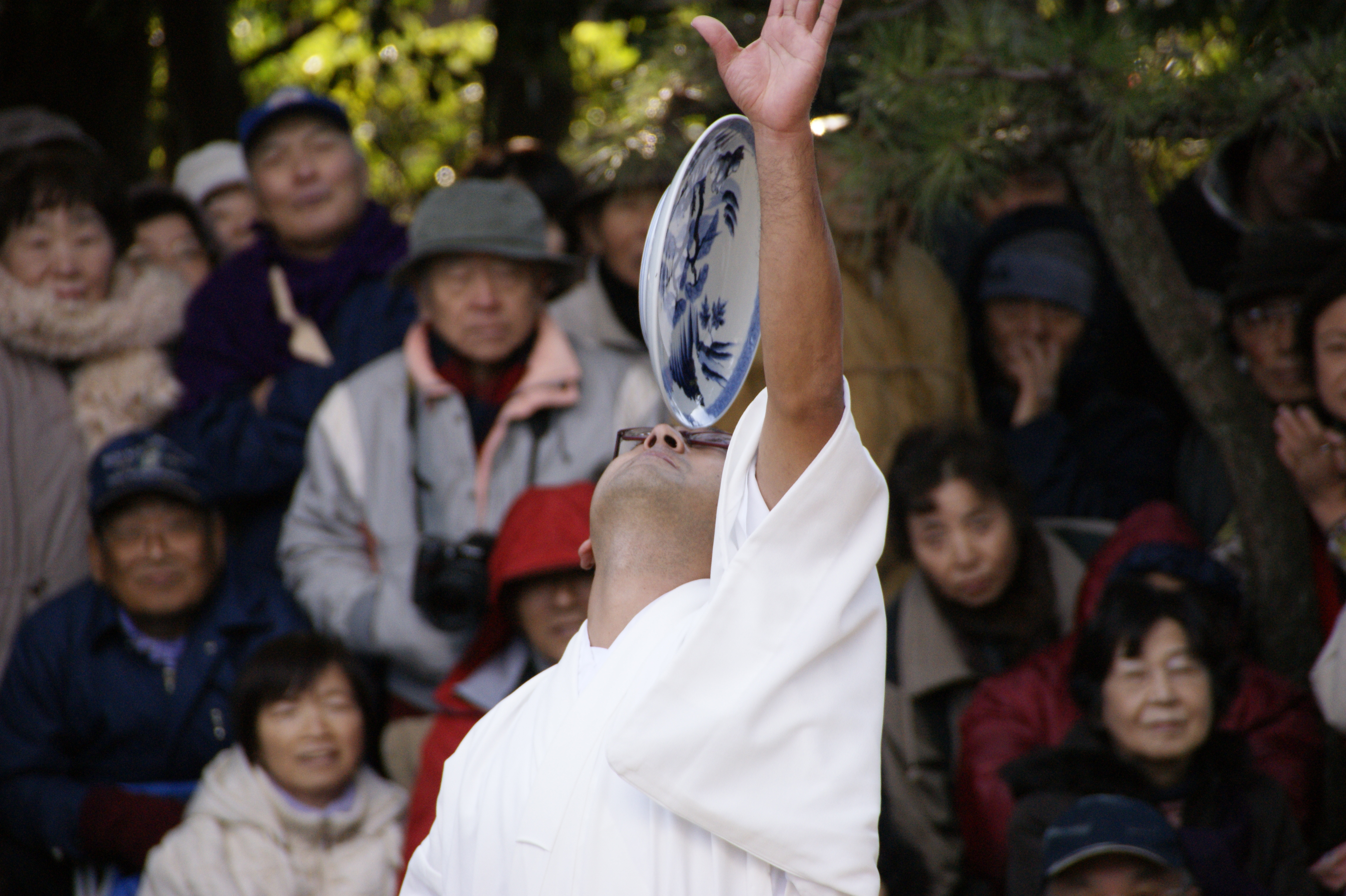 皿の曲です。